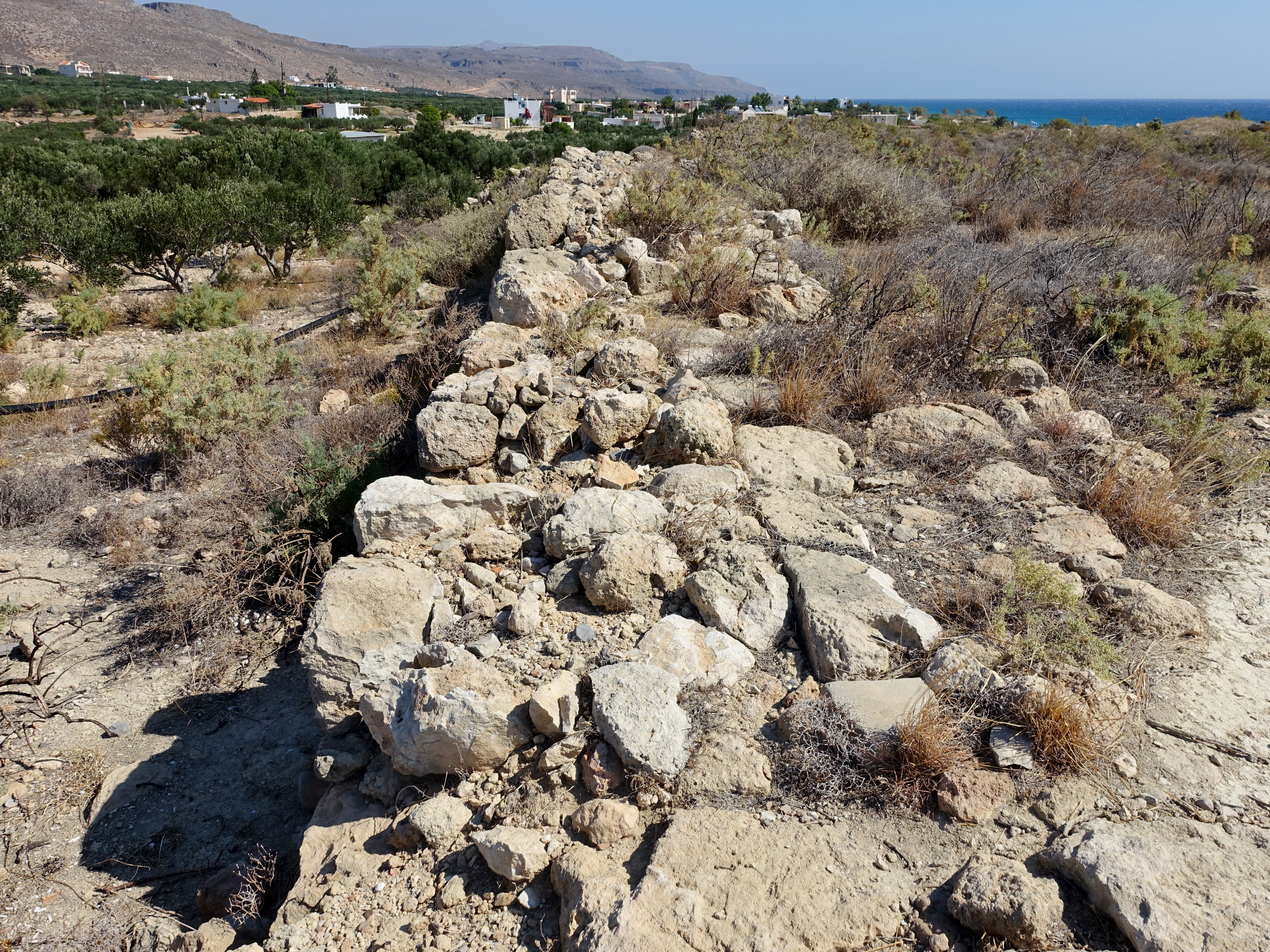 Hellenistische Siedlung auf dem Hügel Farmakokefalo (Φαρμακοκέφαλο) an der Ostküste Kretas bei Xerokambos (Ξερόκαμπος), Gemeinde Sitia, Kreta, Griechenland